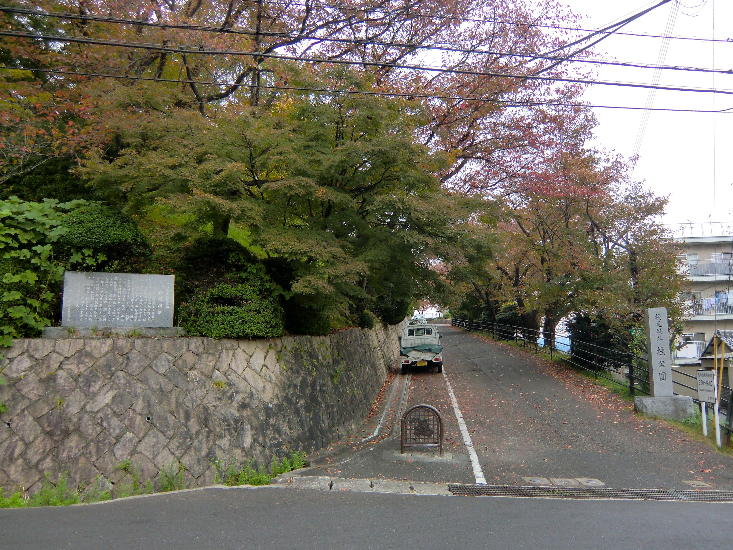 桂公園入口にある桜尾城址の碑（廿日市市）